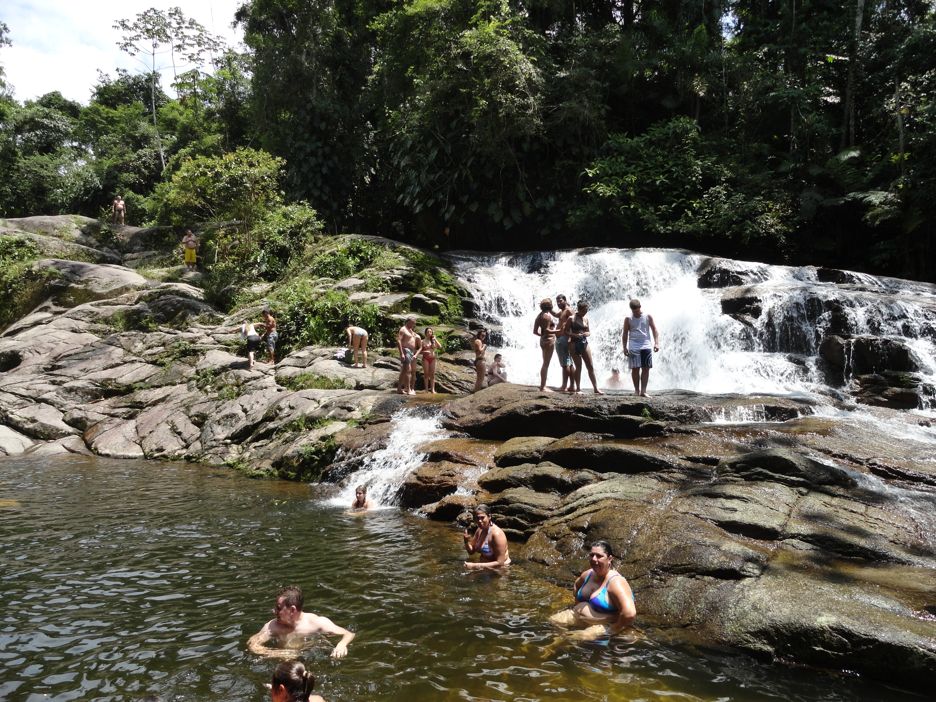 Cascades near Paraty